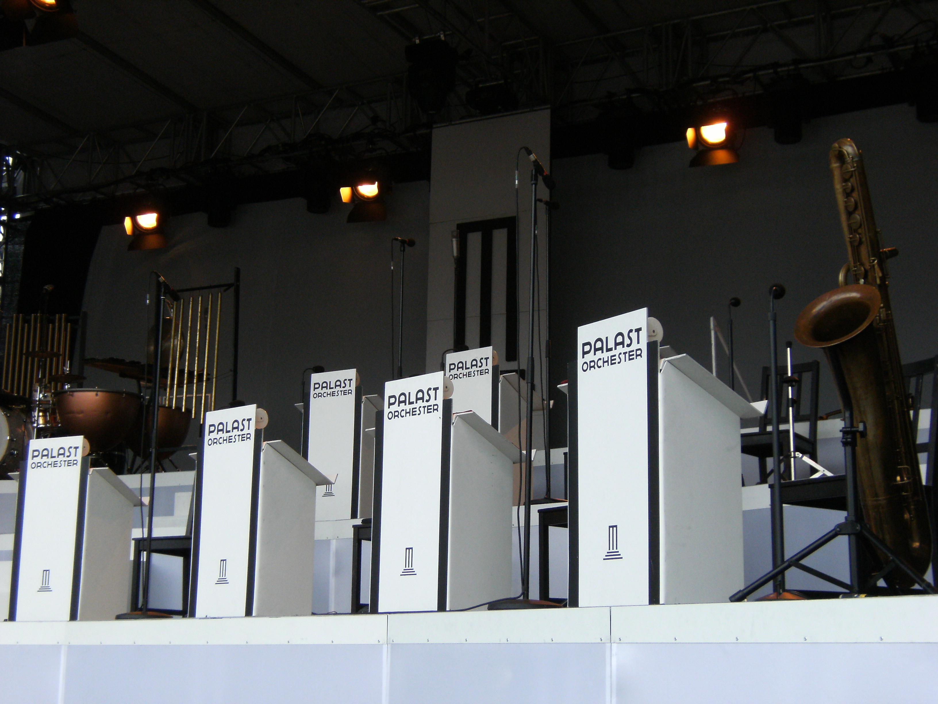 Max Raabe Konzert: Heute Nacht oder nie. F60, Lichterfeld 2008. (Alter Fritz)